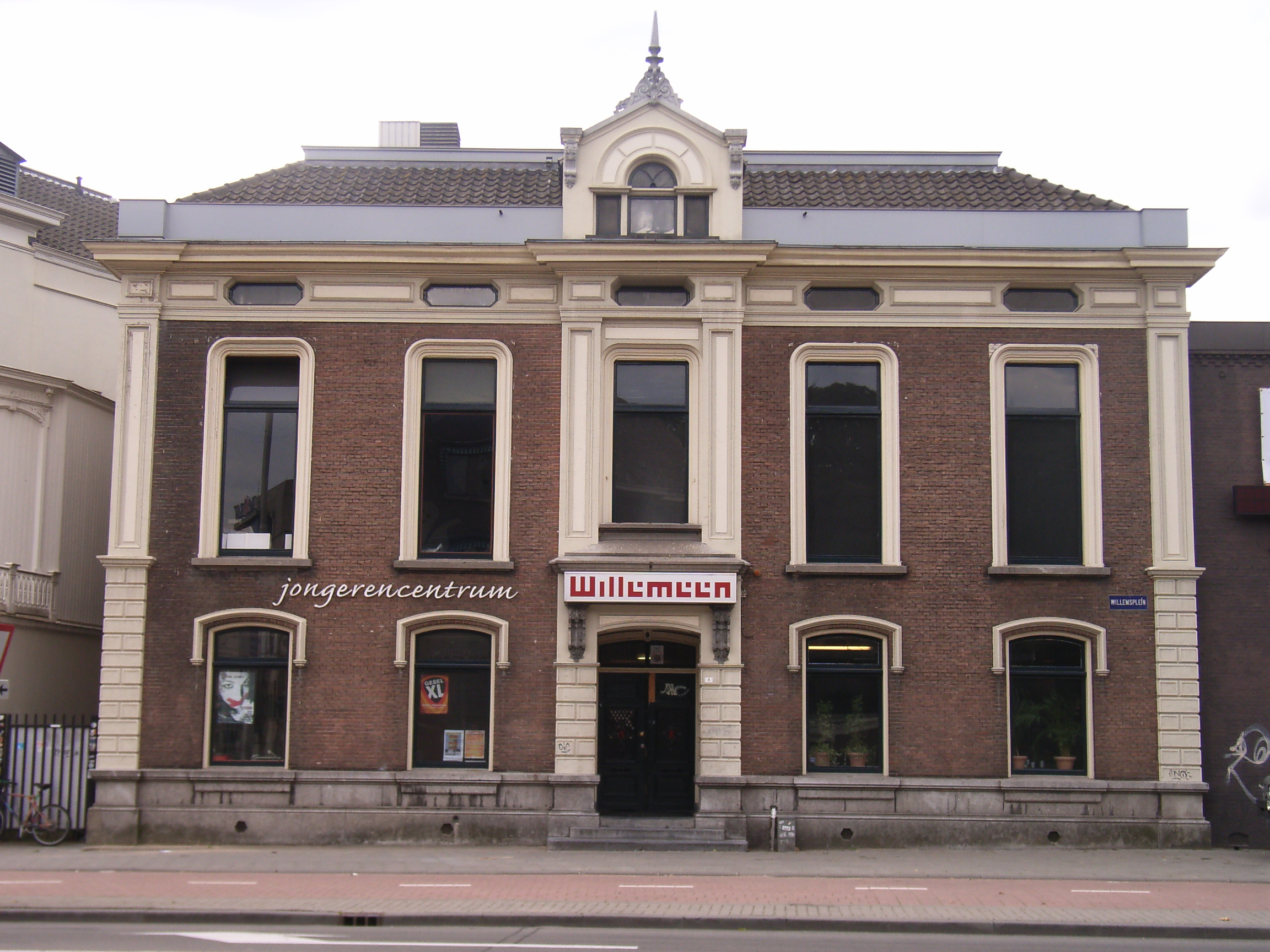 Willemeen gebouw